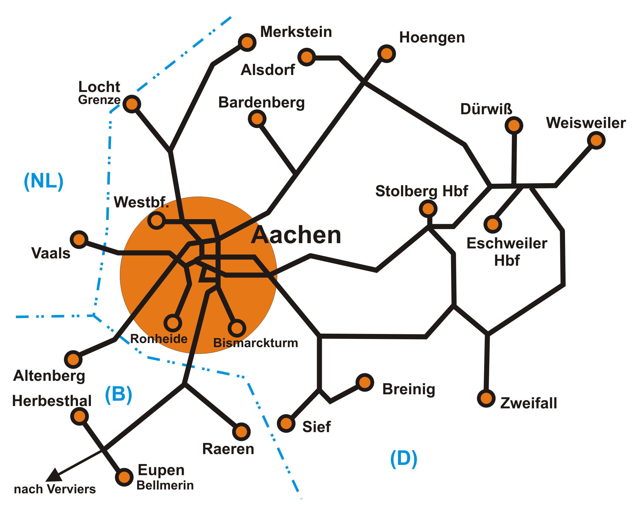 Netz der Aachener Straßenbahn um 1933 - selbst erstellt 2004 - GNU-FDL